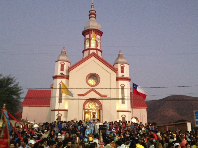 Sotaqui durante la fiesta del niño Dios, enero de 2014.